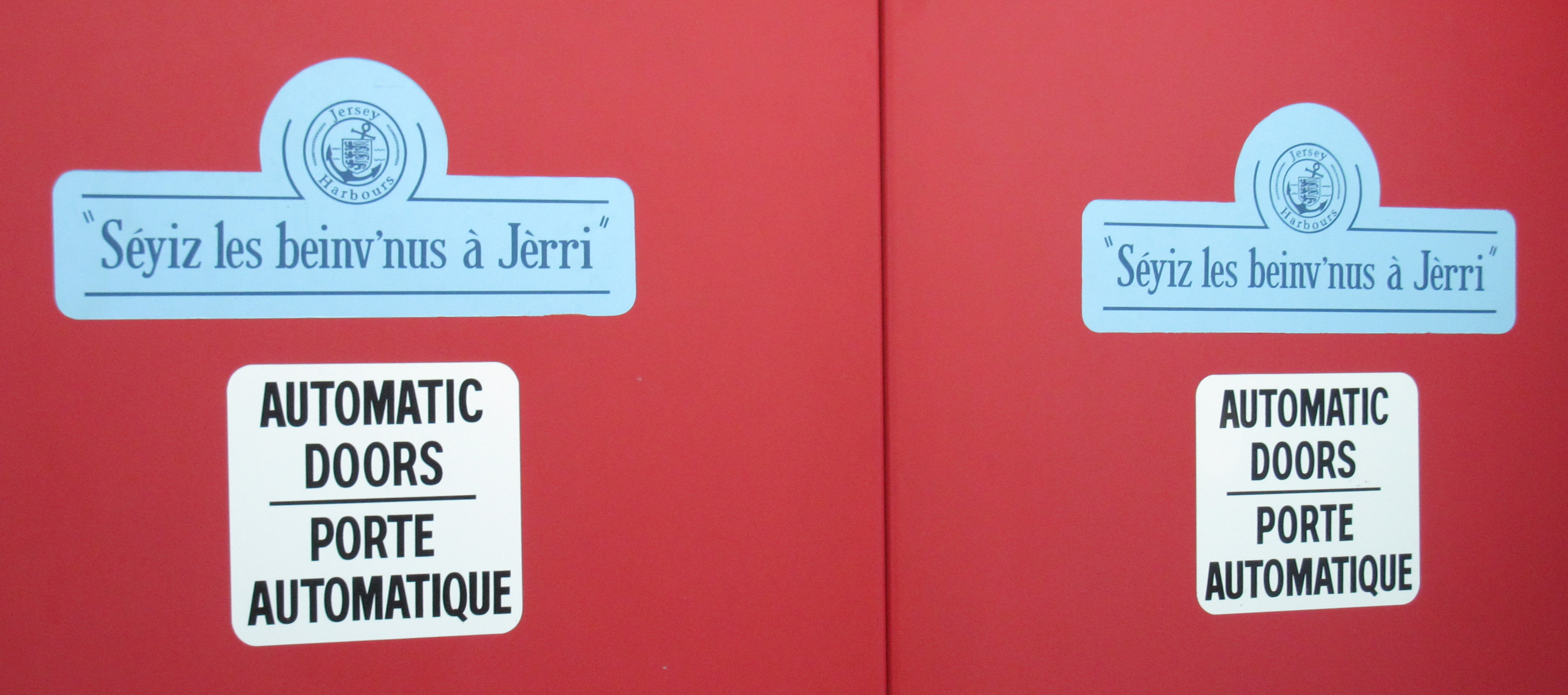 Nrf: Séyiz les beinv'nus à Jèrri, la caûchie Lîzabé, Saint Hélyi, Jèrri